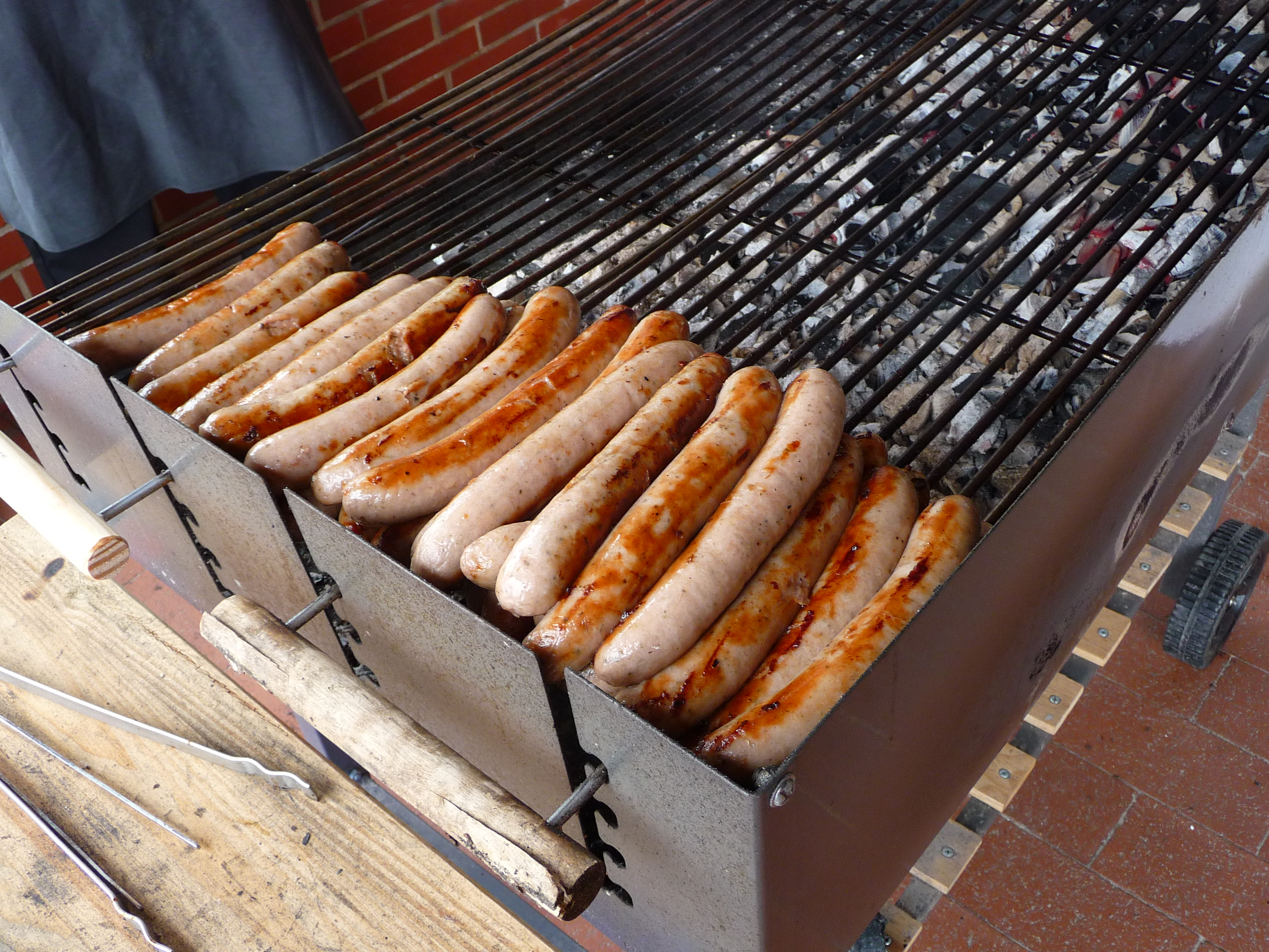 Bratwürste auf einem Grill